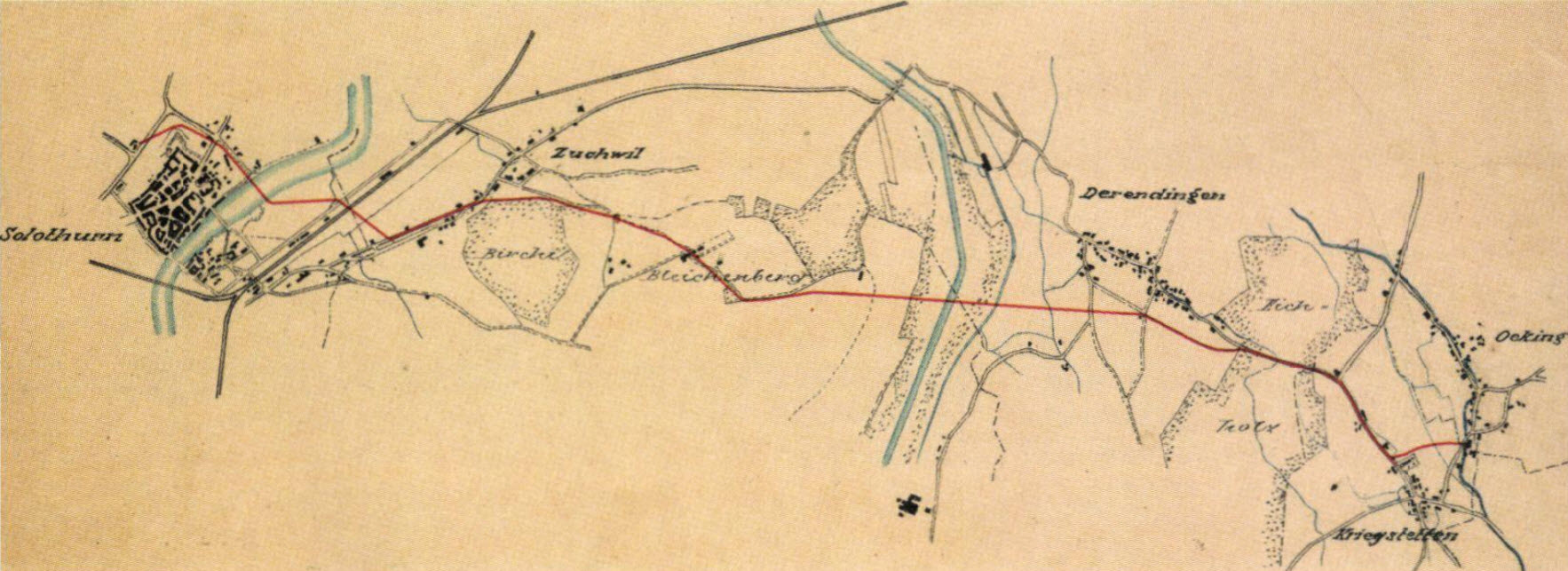 Karte der Gleichstromleitung Kriegstetten–Solothurn